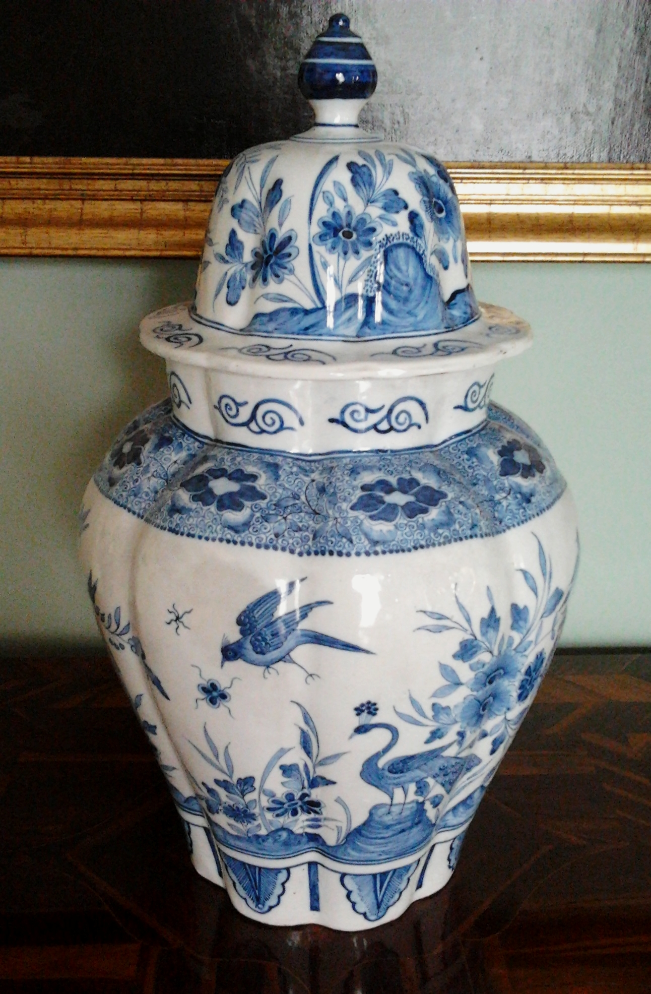 Blaumalerei: Keramik, sogenannte Fayence, naturfarbener Ton mit weißer Zinnglasur überzogen und mit Kobaltblau bemalt.